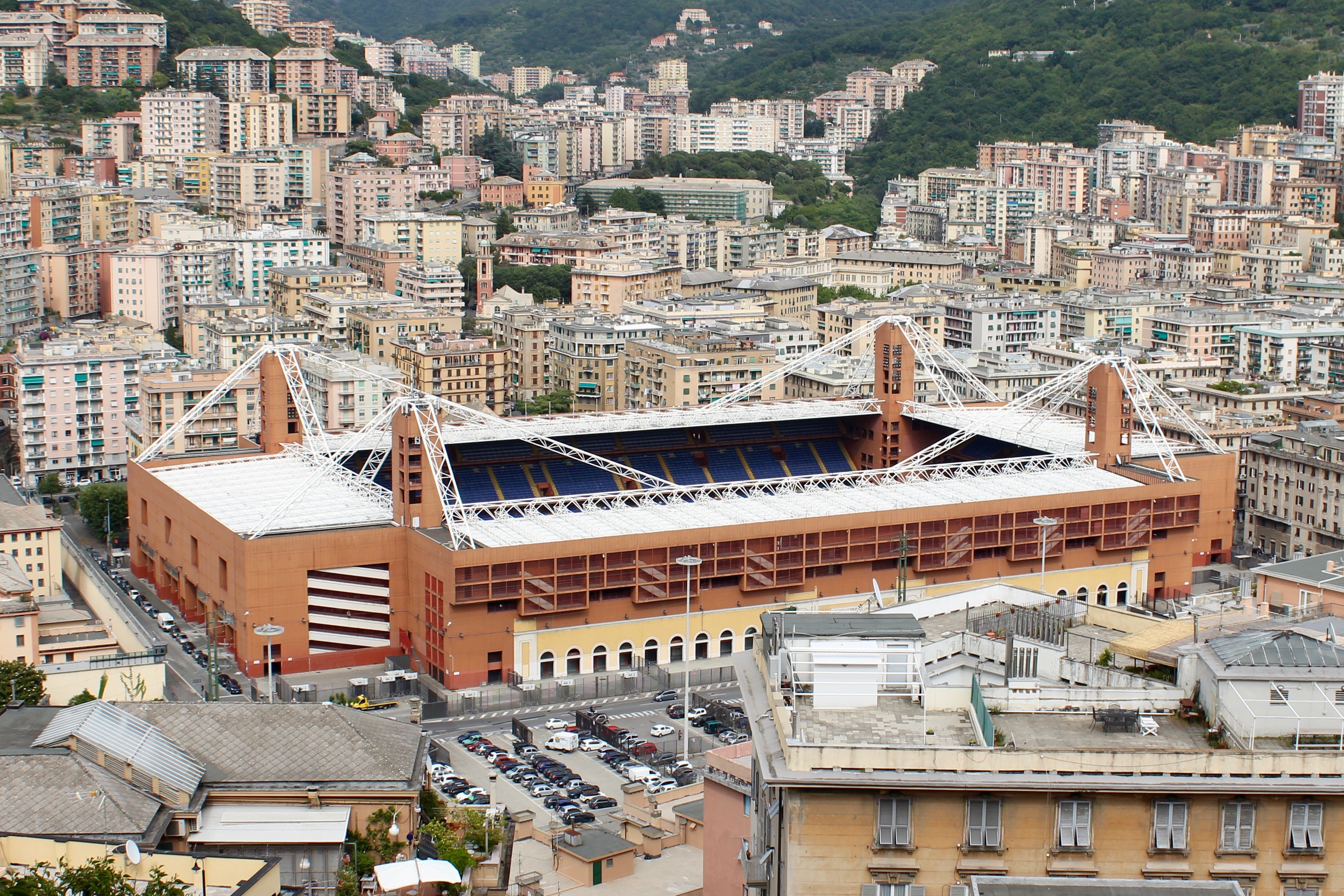 Lo stadio Luigi Ferraris visto da S. Bartolomeo